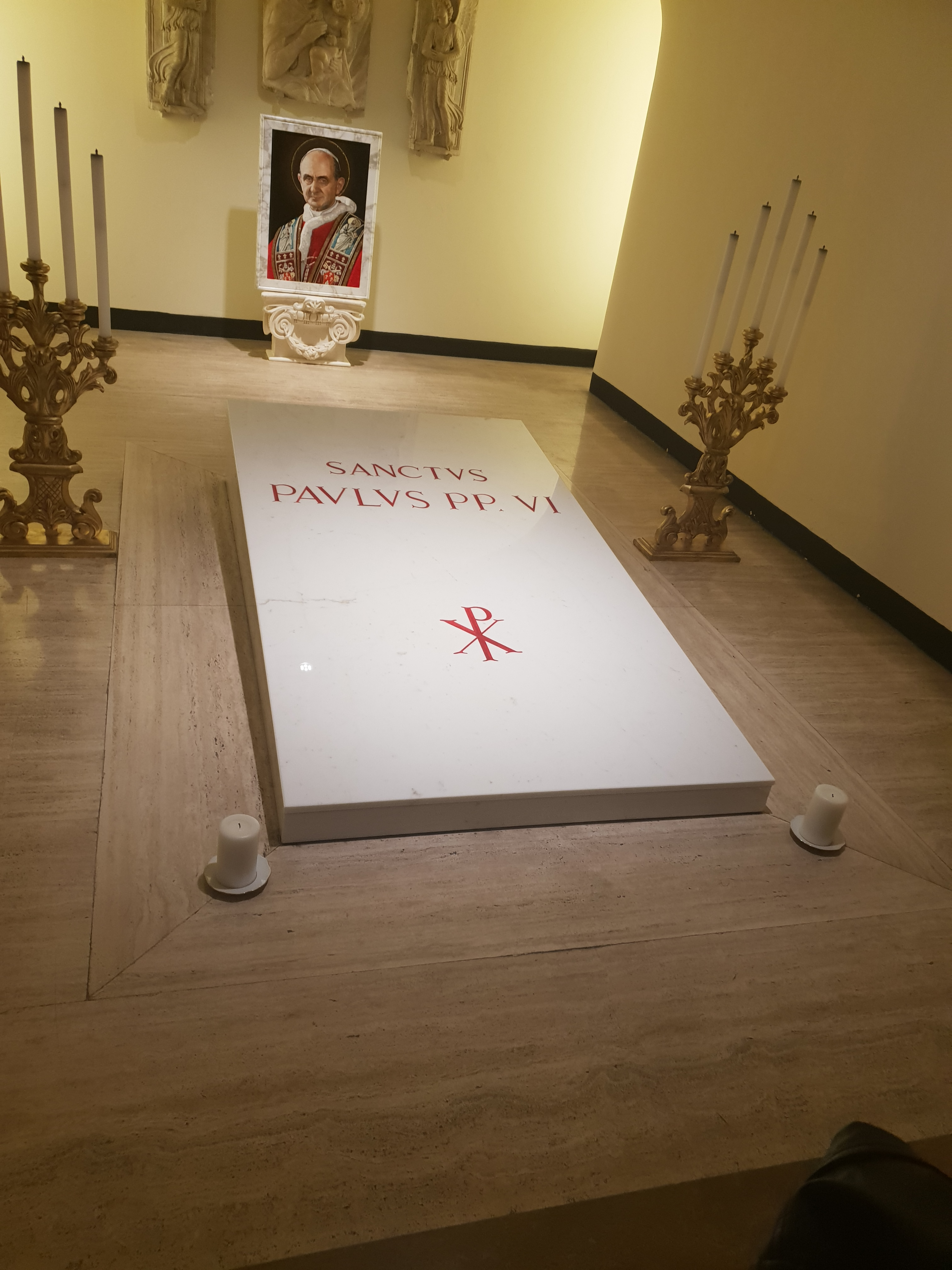 Tomba di papa Paolo VI nel 2018 dopo la carbonizzazione.